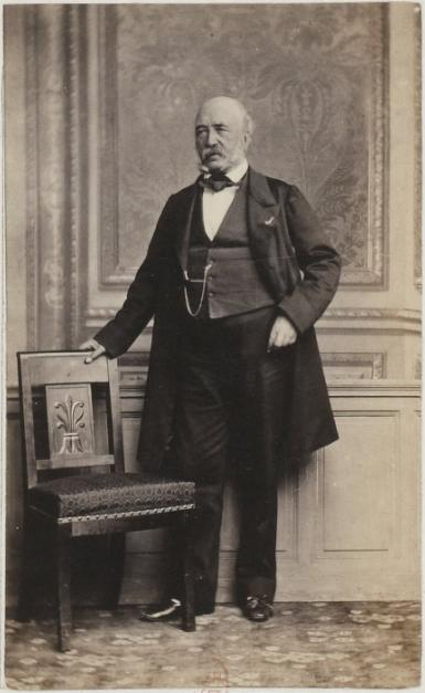 Louis Belmontet est né à Montauban (Tarn-et-Garonne) le 25 mars 1798 et mort à Paris le 14 octobre 1879. Il est connu pour avoir dirigé la Société d'Aix.